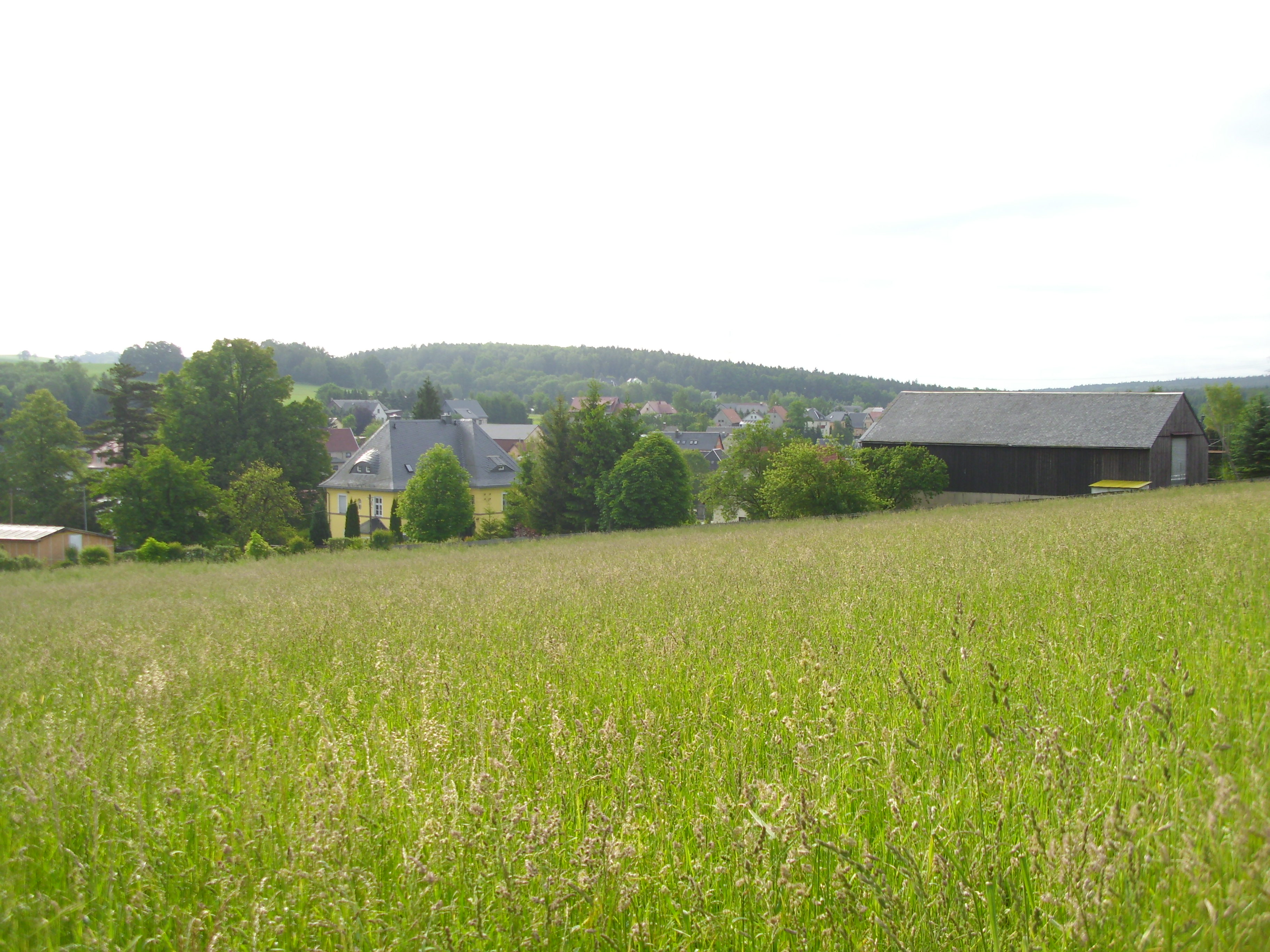 Blick vom Friedhof Oelsa auf das Oberdorf von Oelsa.